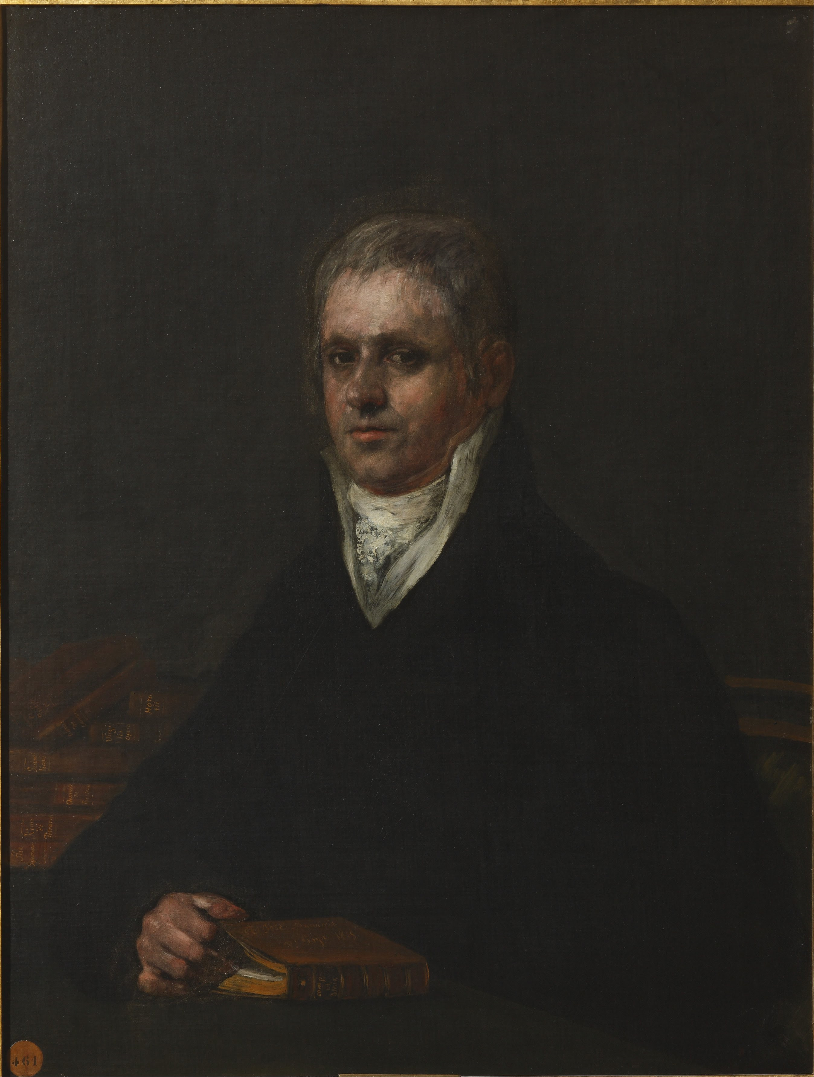 Retrato del erudito español José Luis Munárriz (1762-1830).